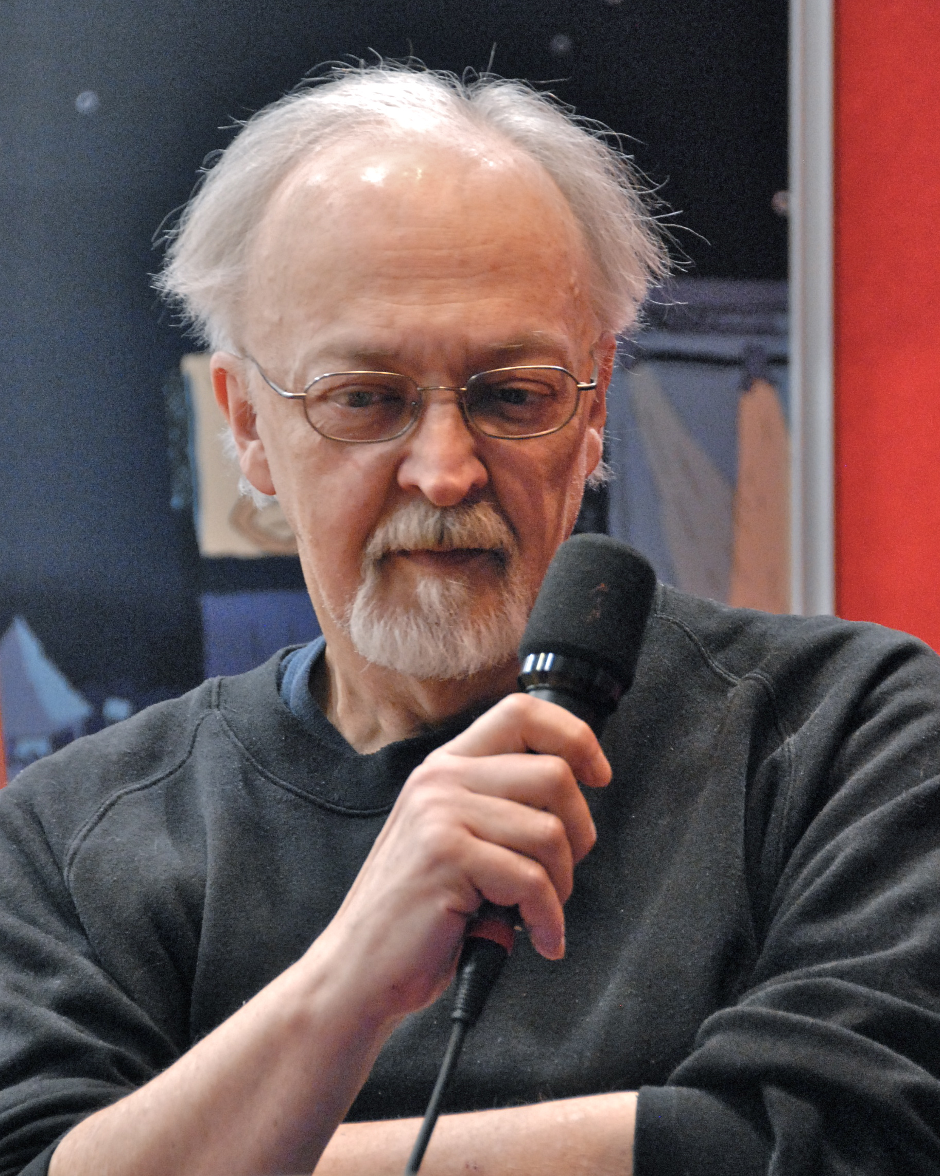 Pierre Fournier, lors du Salon international du livre de Québec 2012